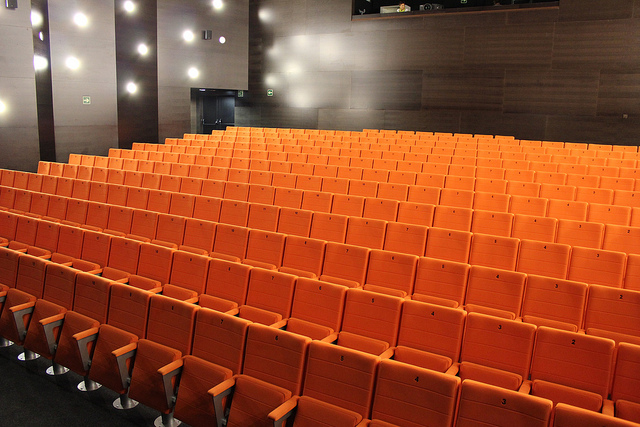 Teatro Felix Petite en el Centro Cívico Ibaiondo